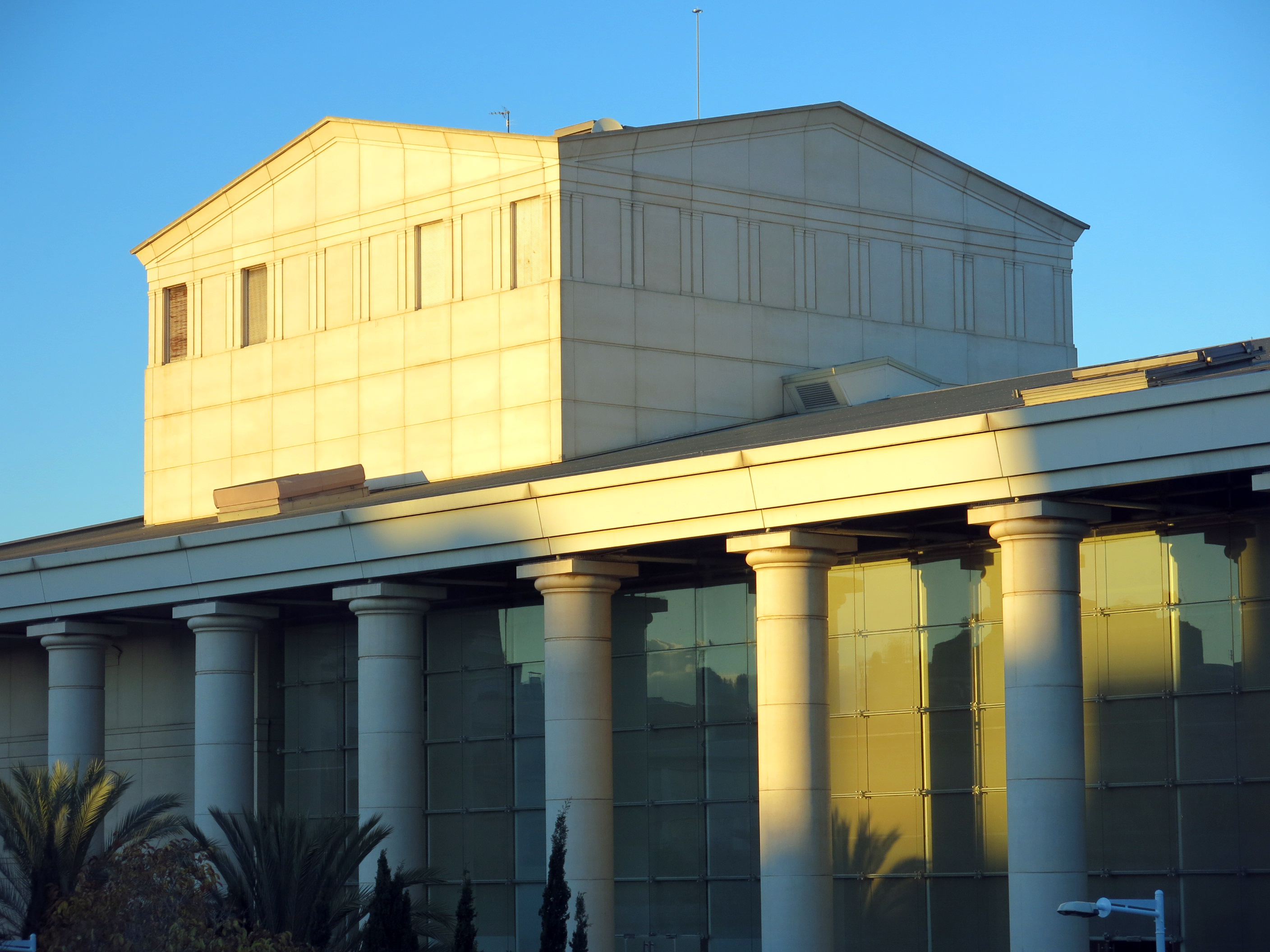 Teatre Nacional de Catalunya (Barcelona)